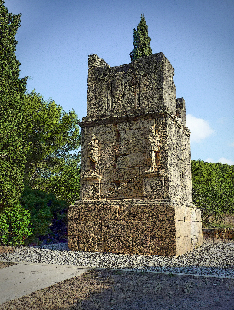 Monumento funerario romano del S. I d.C. Está ubicado a unos 6 kilómetros de la ciudad de Tarragona, junto a la Via Augusta (actual N-340). Forma parte del conjunto arqueológico declarado Patrimonio de la Humidad por la Unesco en el año 2000. Tiene dos representaciones de la divinidad funeraria Attis, erróneamente atribuidas a los hermanos Escipión, de ahí su nombre. Edición especial para el concurso Wiki Loves Monuments 2011 España